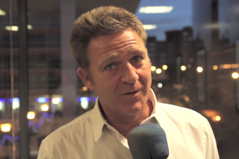 Juanjo Artero da el pregón de las Fiestas 2012 desinteresadamente.